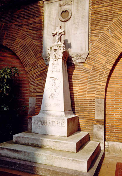 Monument aux anciens élèves morts pour la Patrie (Institut Sainte-Marie)